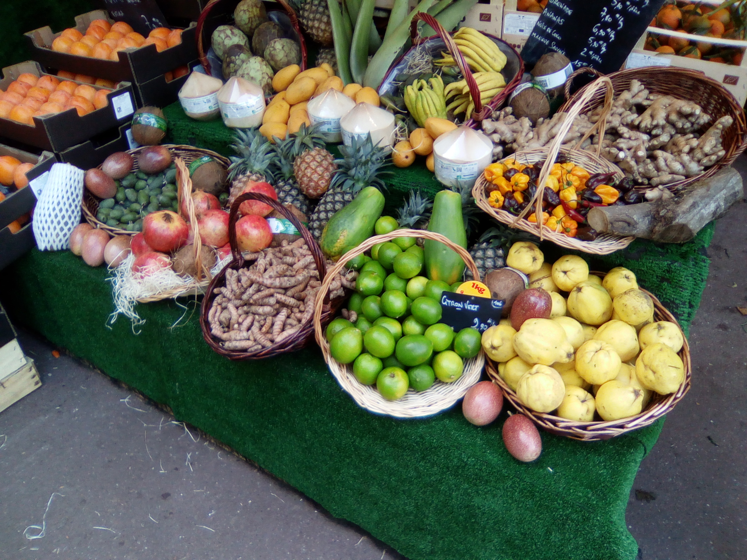 Salon Marjolaine.